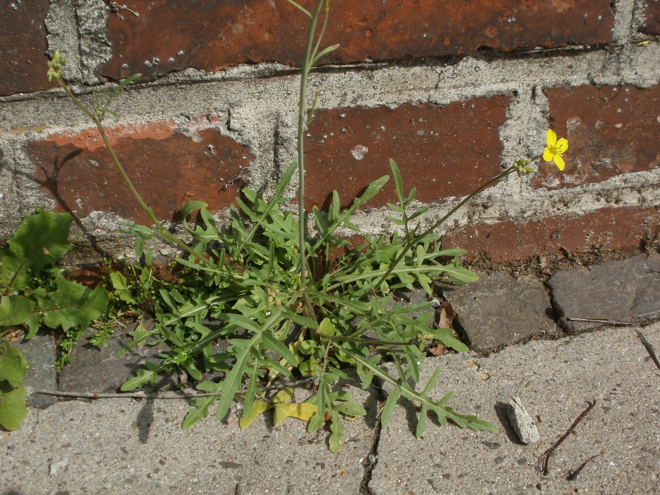 Wilde Rauke am Kieselhumes in Saarbrücken